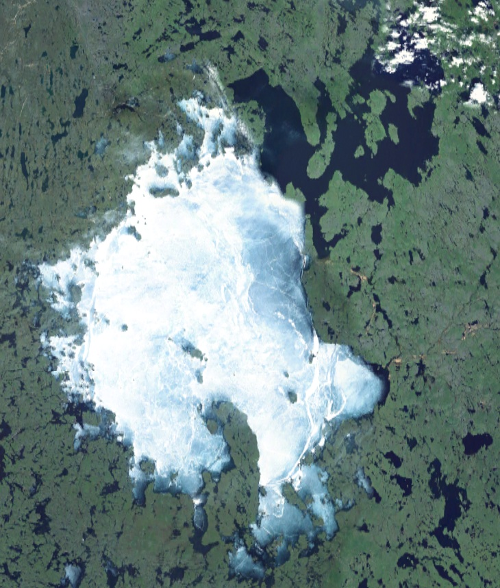 Lac Dubawnt, Nunavut